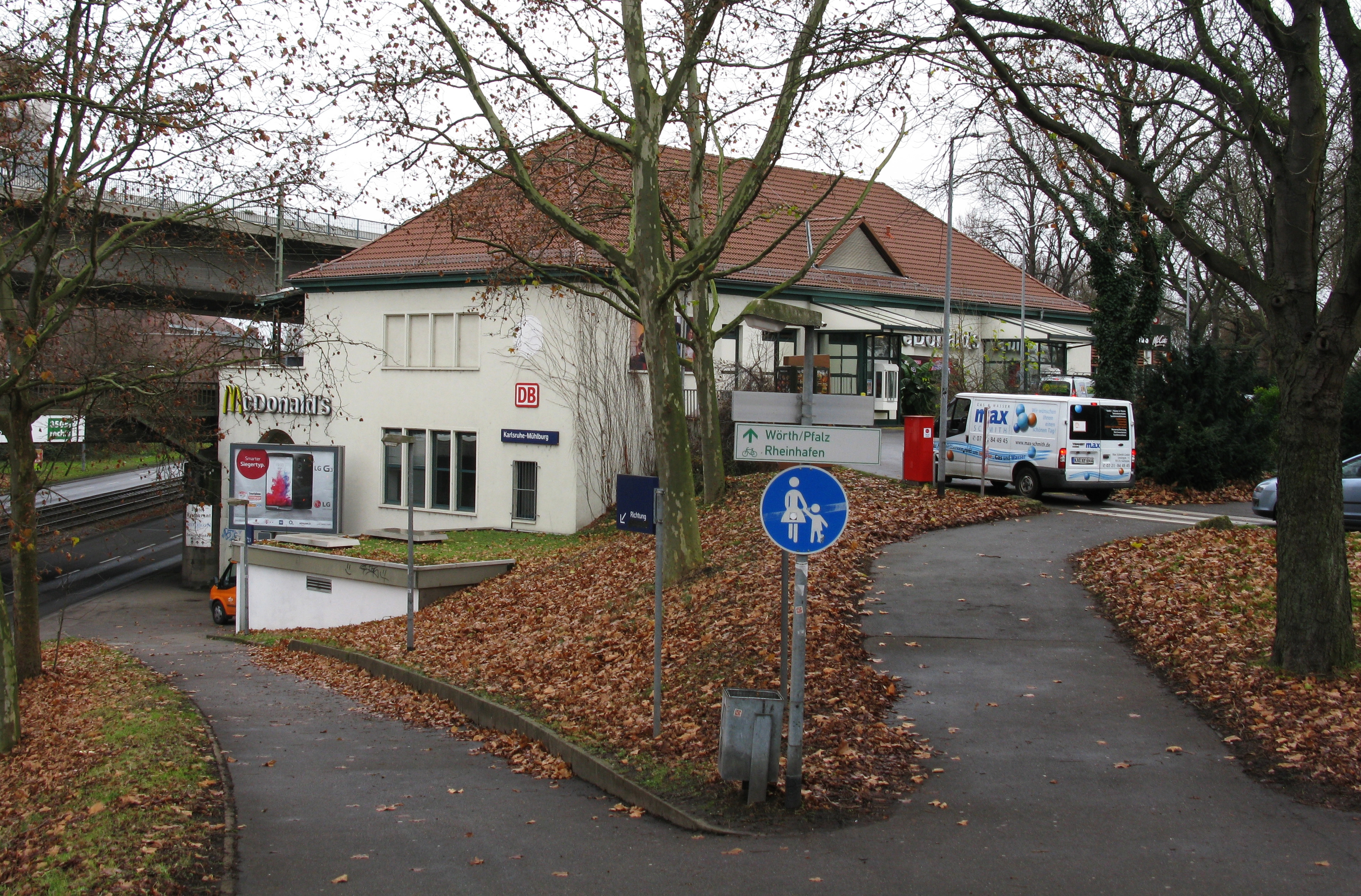 Bahnhof Karlsruhe-Mühlburg mit McDonald's Drive-in